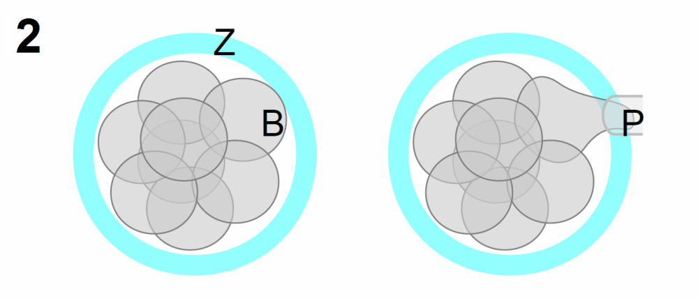 Biopsie blastomery embrya pro preimplantační genetickou diagnostiku